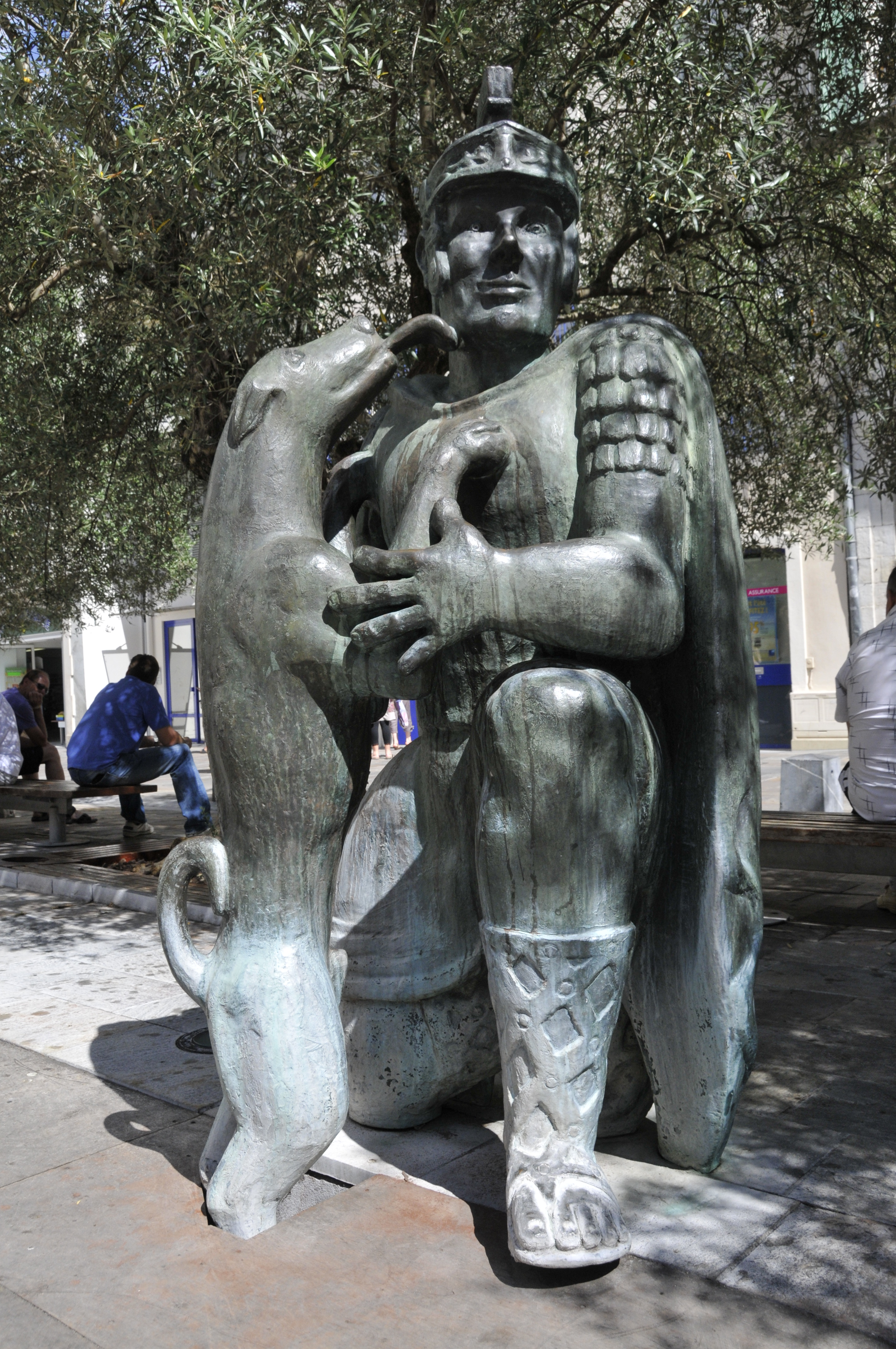 Dax